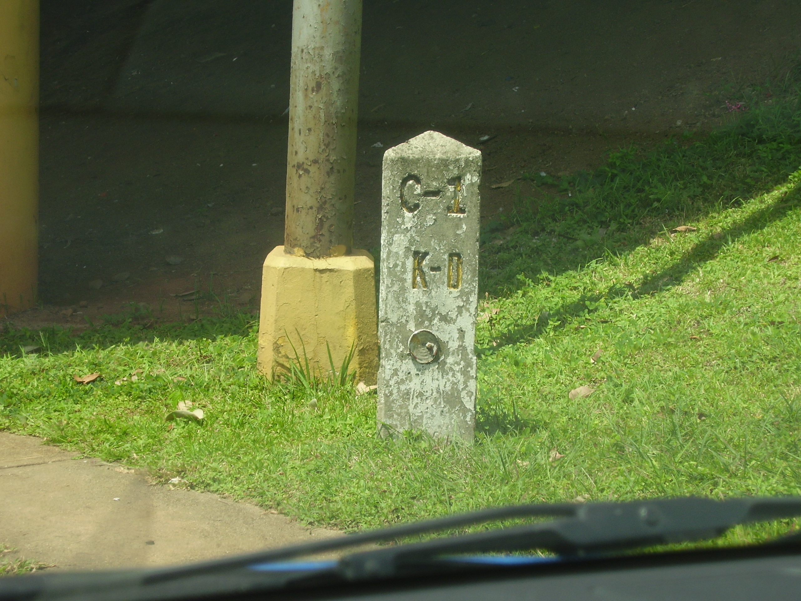 Monumento Kilometro Cero en Panama